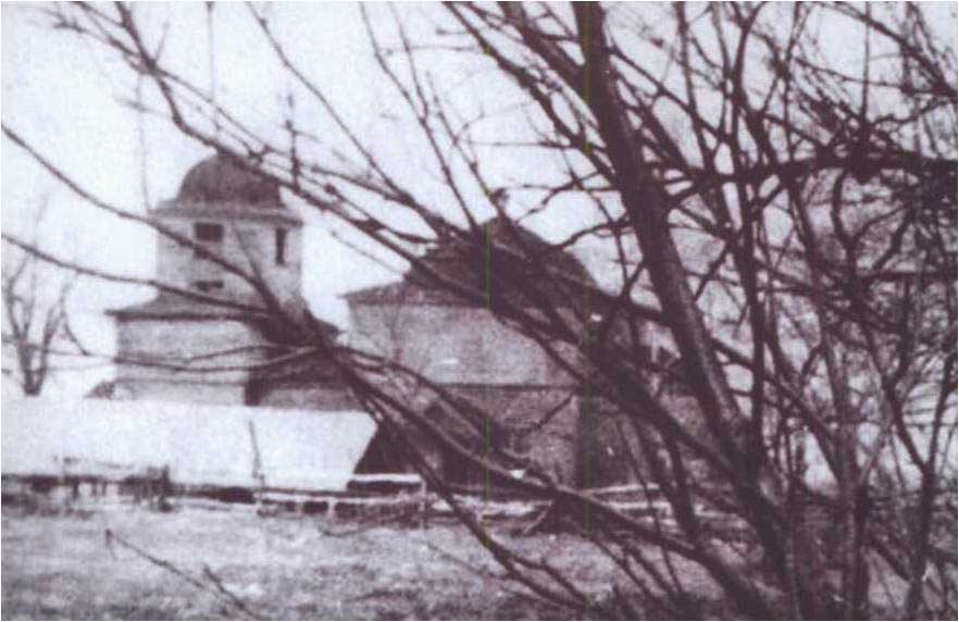 Беларуская (тарашкевіца): Судзілы (Sudziły). Царква